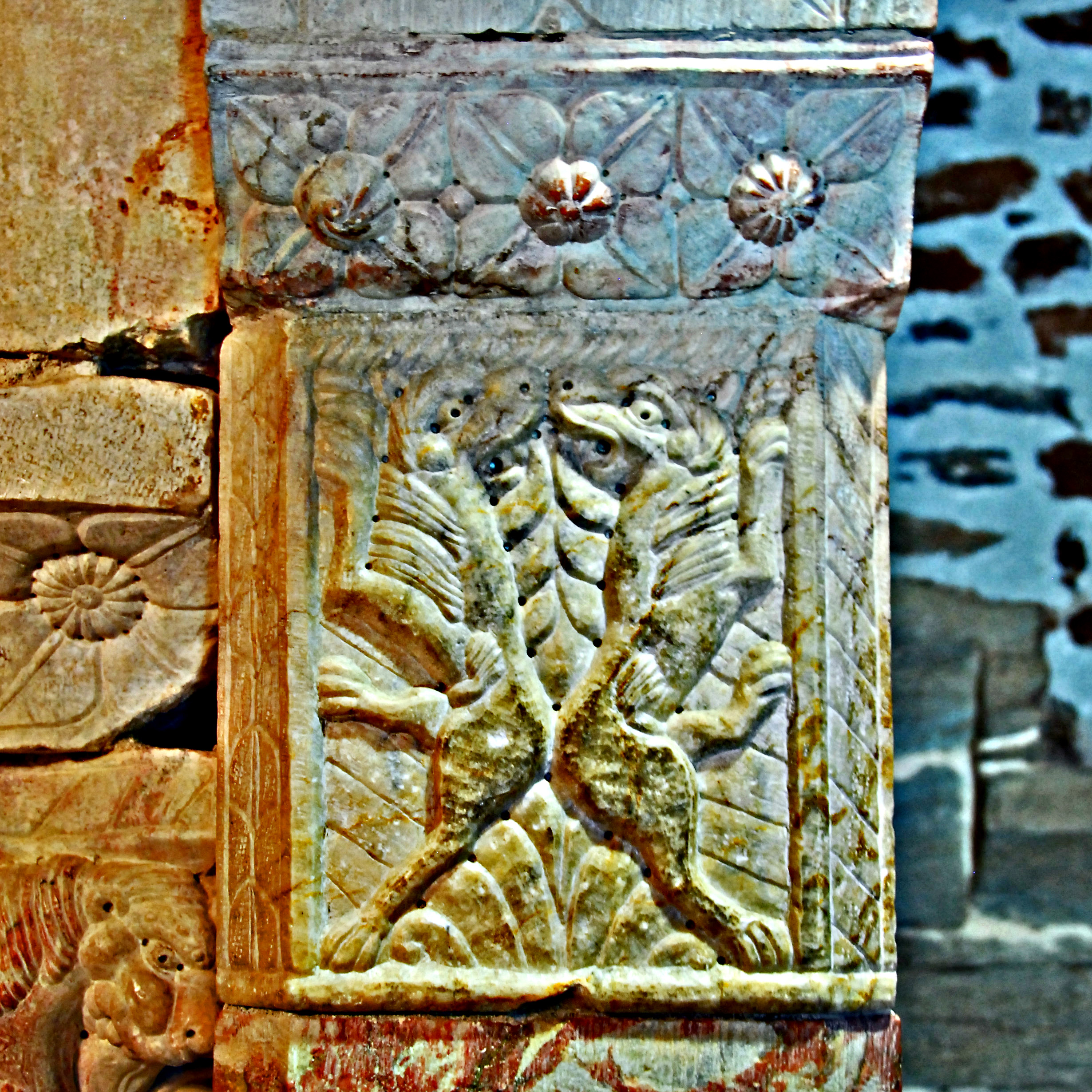 Serrabone, Empore, Laibung Ostwande, Relief Nr.16